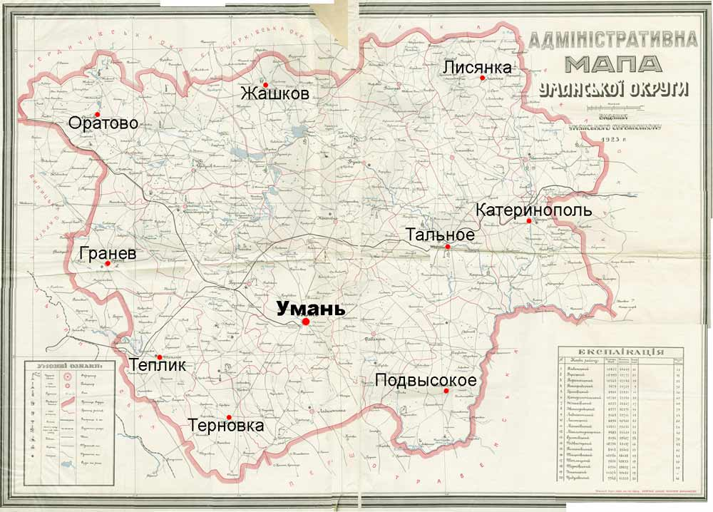 Мапа Уманської округи